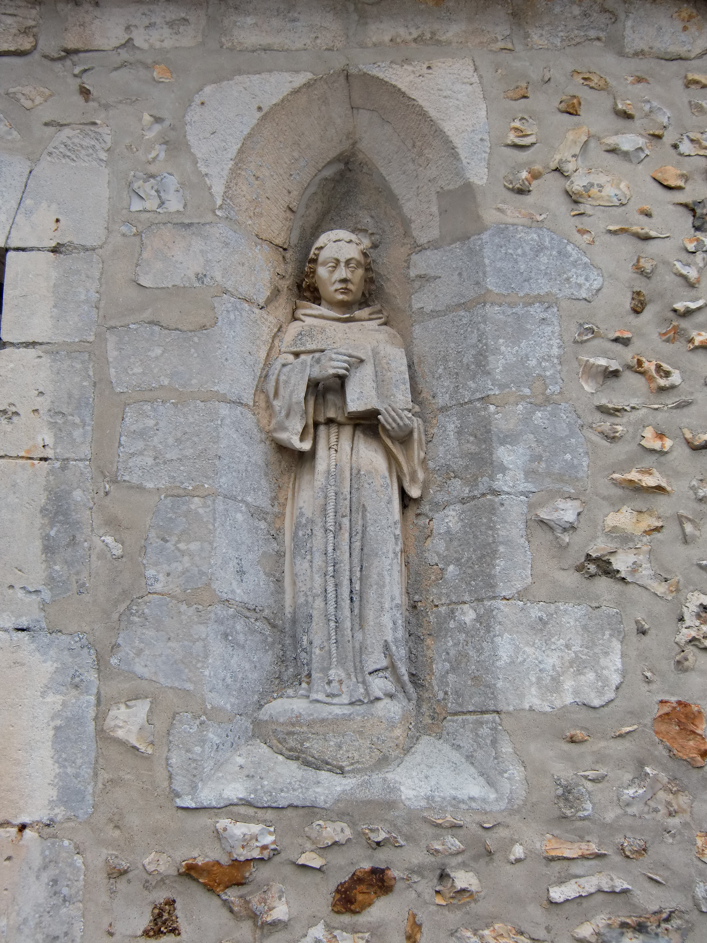 Église de Saint-Léger-du-Gennetey (Eure, Normandie, France) - Statue sur le mur extérieur Sud